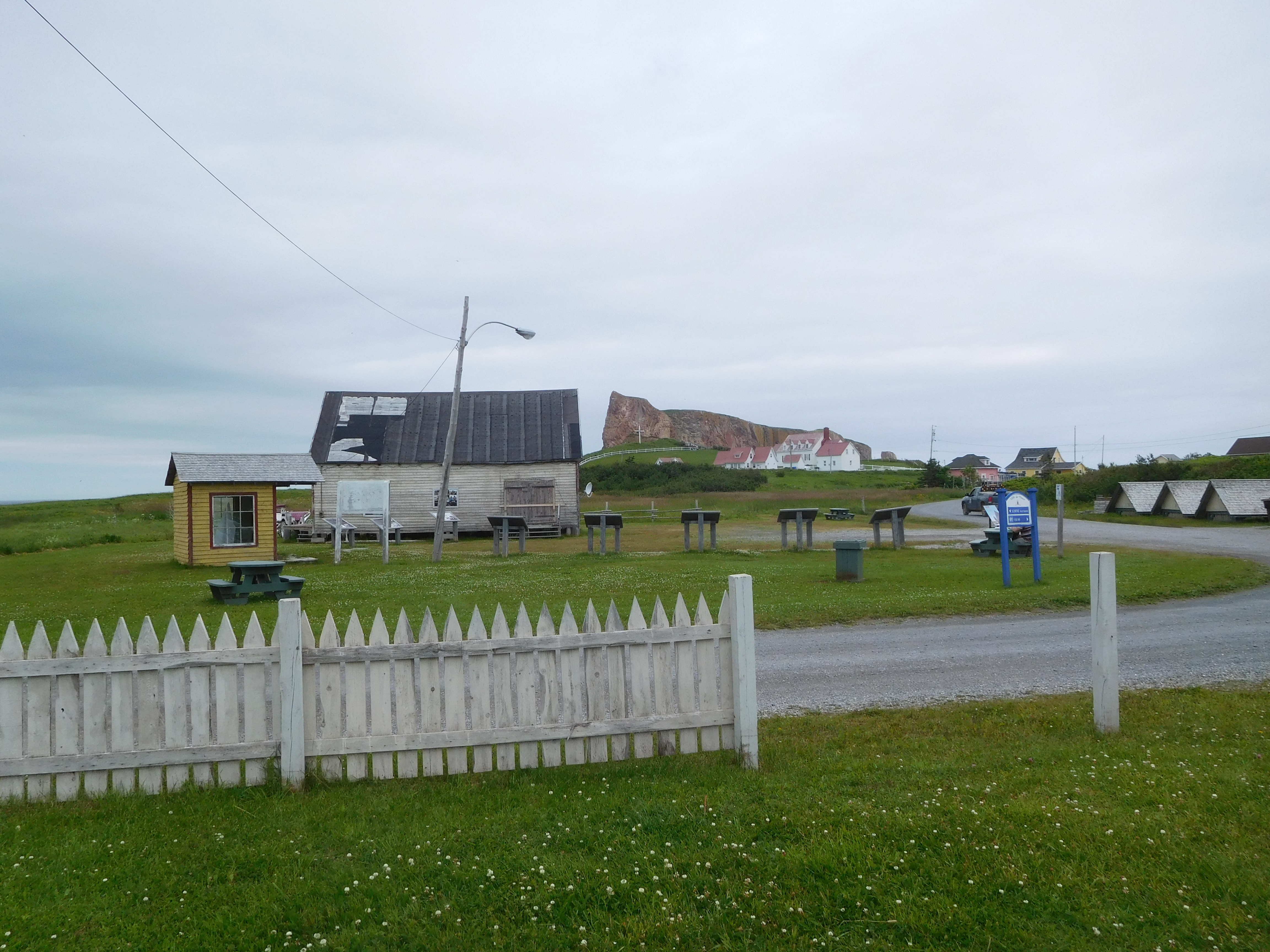 Site du tournage du film La Maison du pêcheur, Percé, Québec48.5247903,-64.2100148